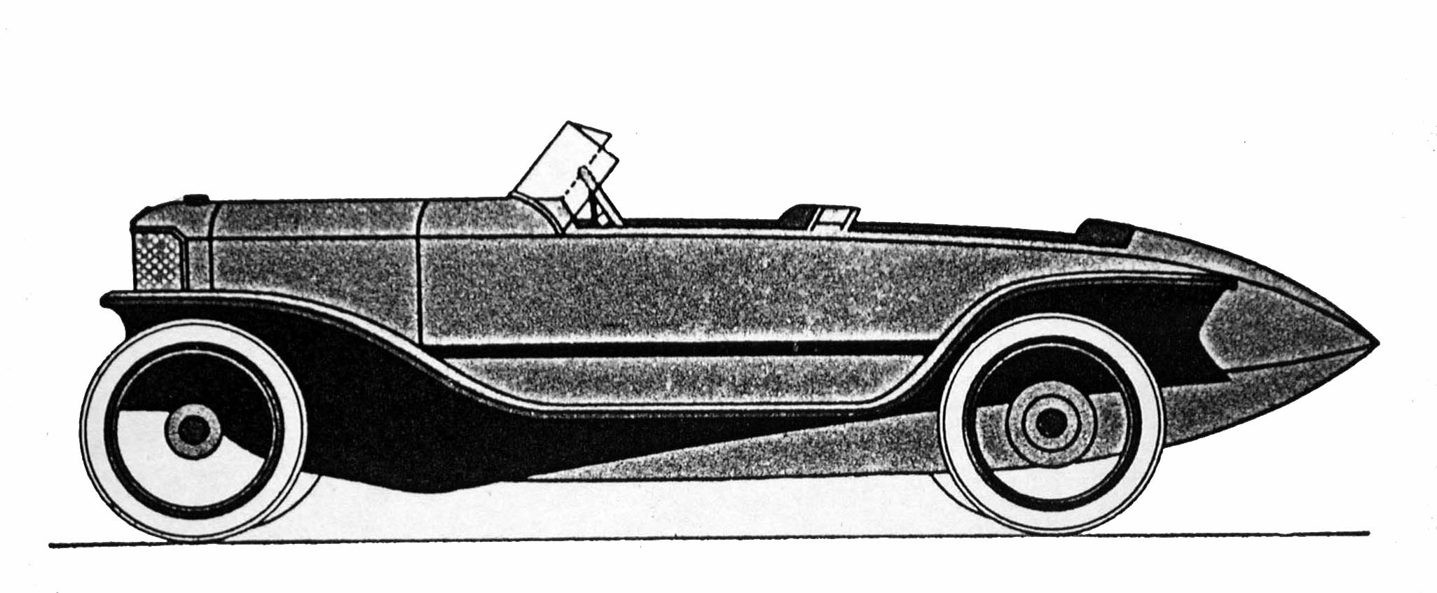 Selve 8/40 PS Sport, type SL 40, 1924